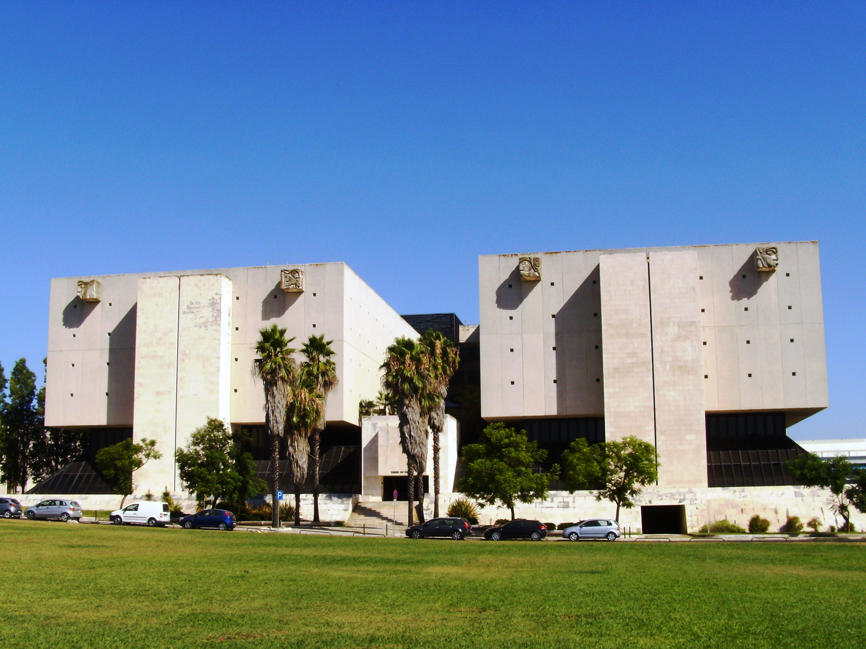 Torre do Tombo, Campo Grande, Lisboa, Portugal: vista da fachada.